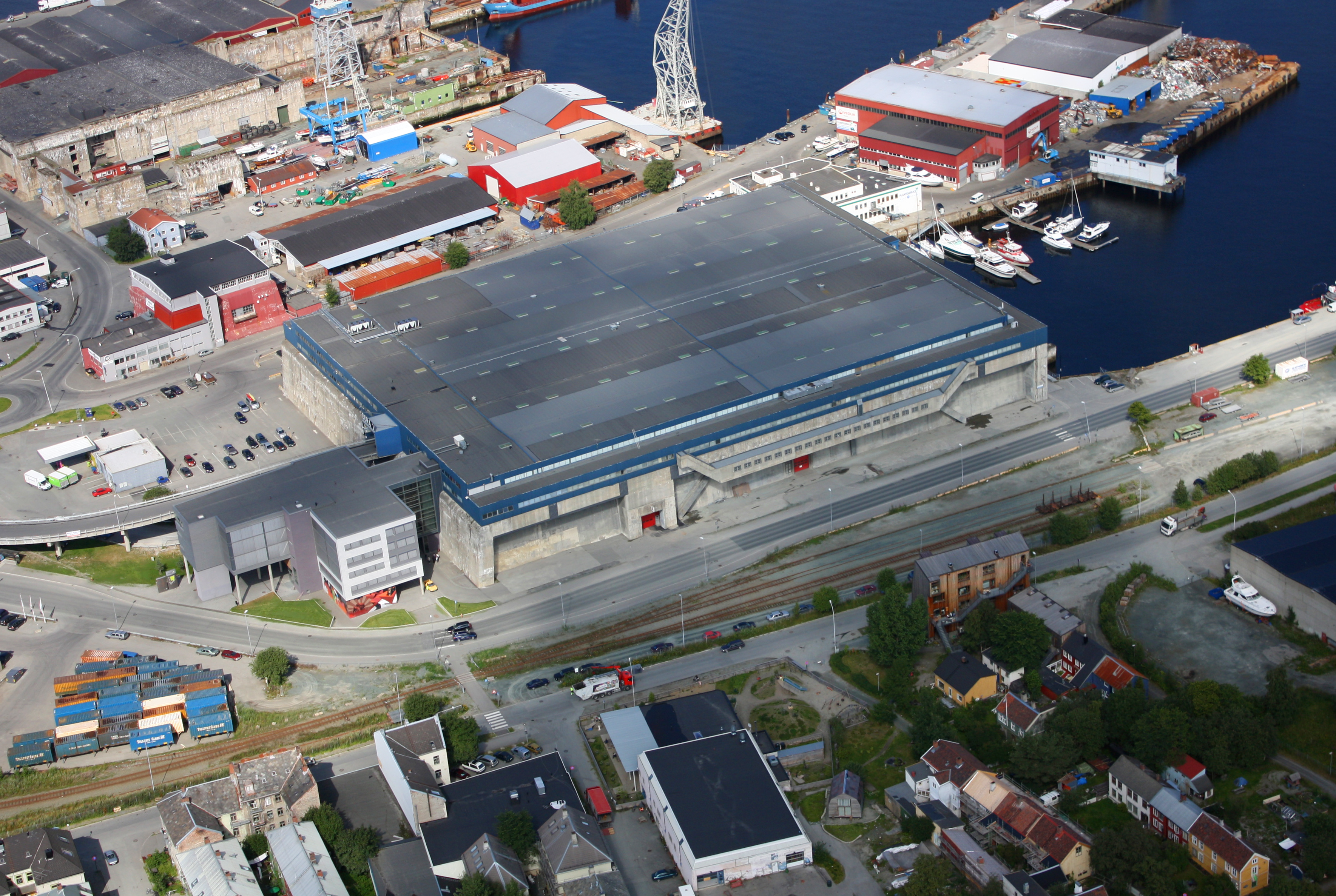 Dora 1